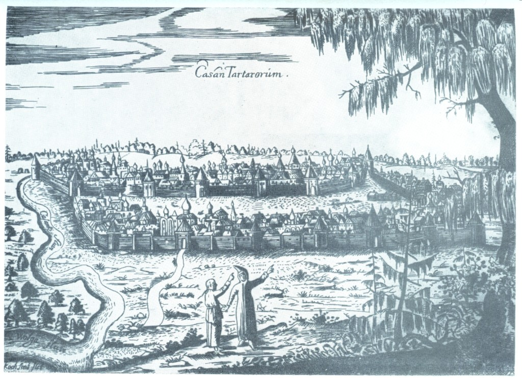 Kazan by Adam Olearius